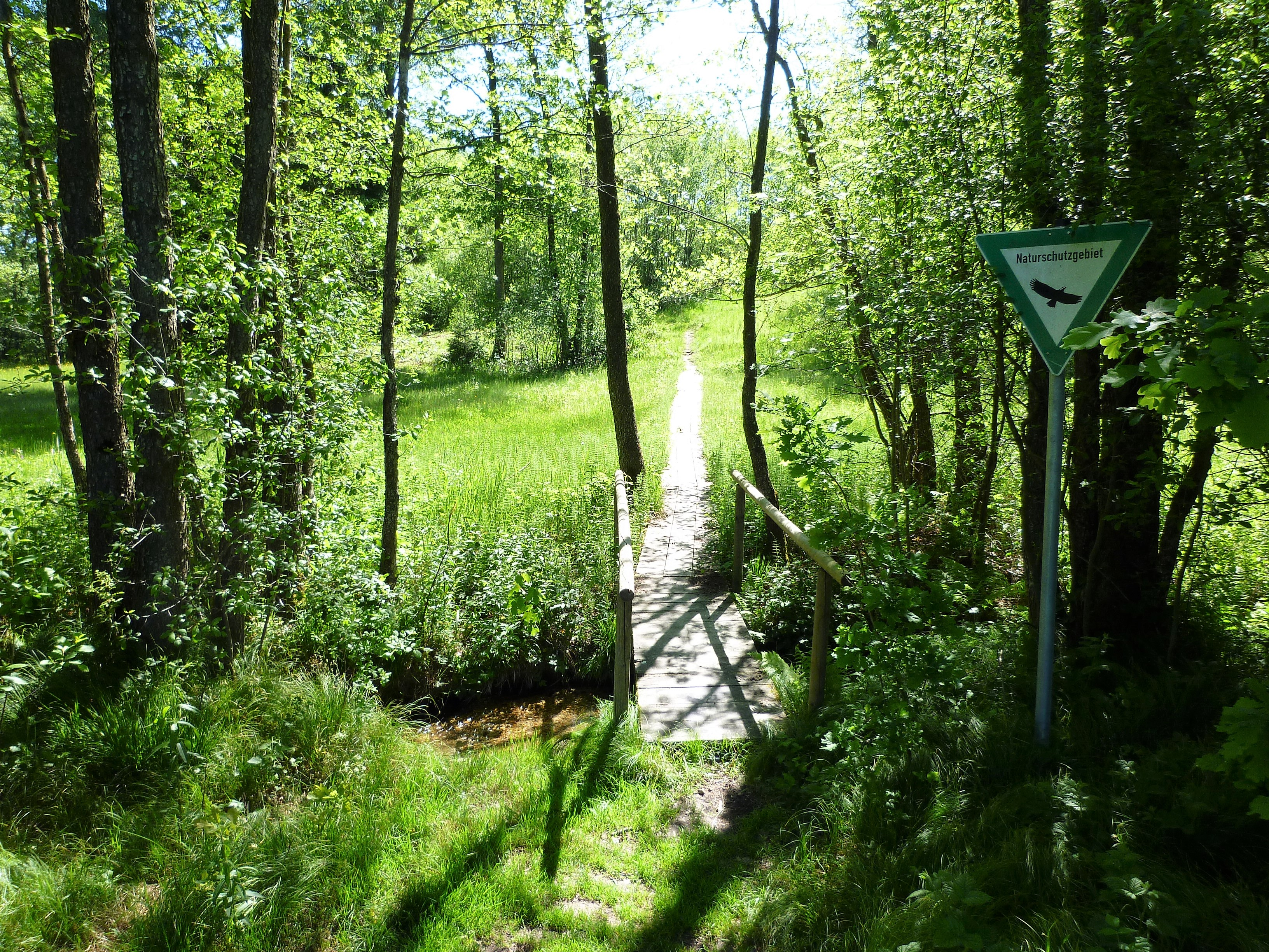 Das Schuttholzer Moor bei Schöllnach ist FFH-Gebiet und Naturschutzgebiet zugleich. Hier führt ein kleiner Steg zum NSG über den Röhrbrunnenbach.